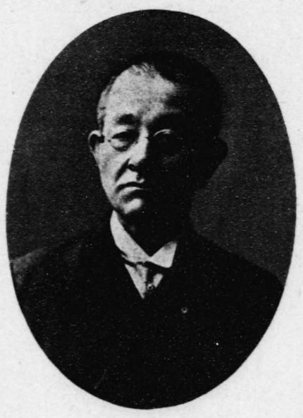 山脇玄